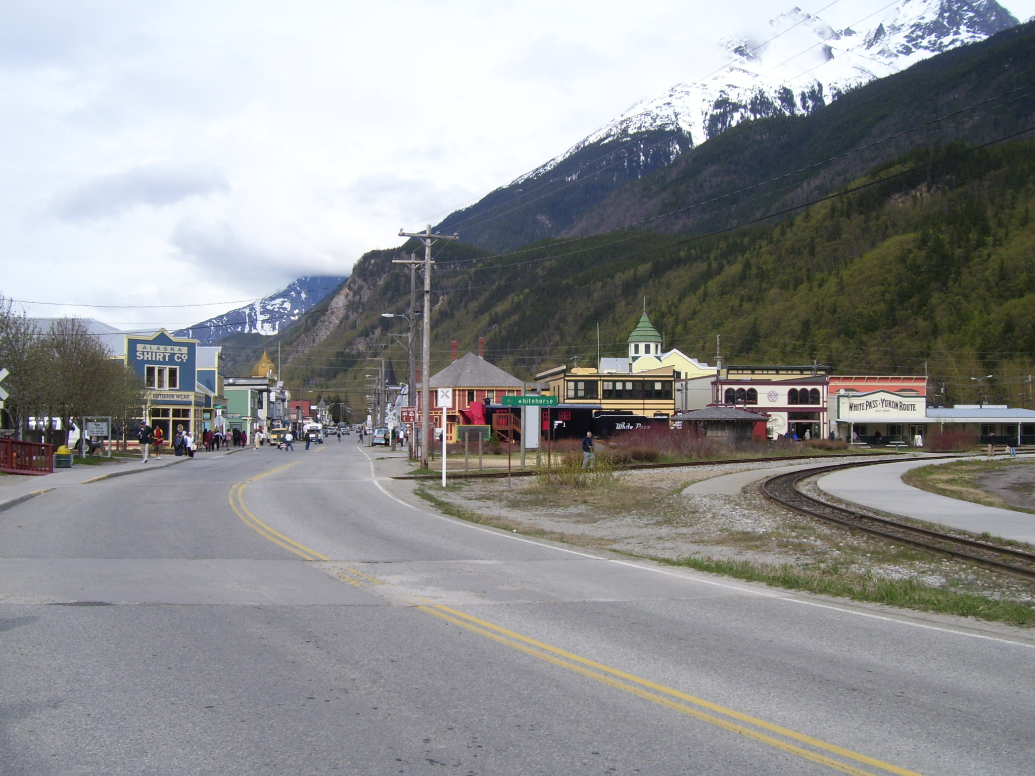 Broadway Avenue in Skagway, Alaska